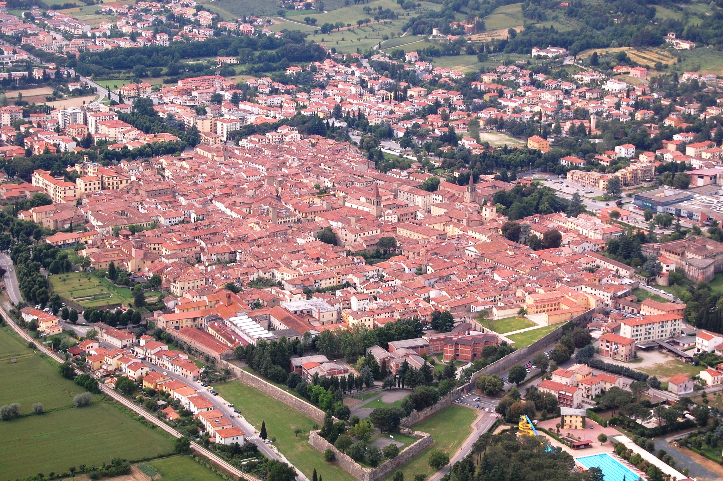 Veduta aerea della citta di sansepolcro